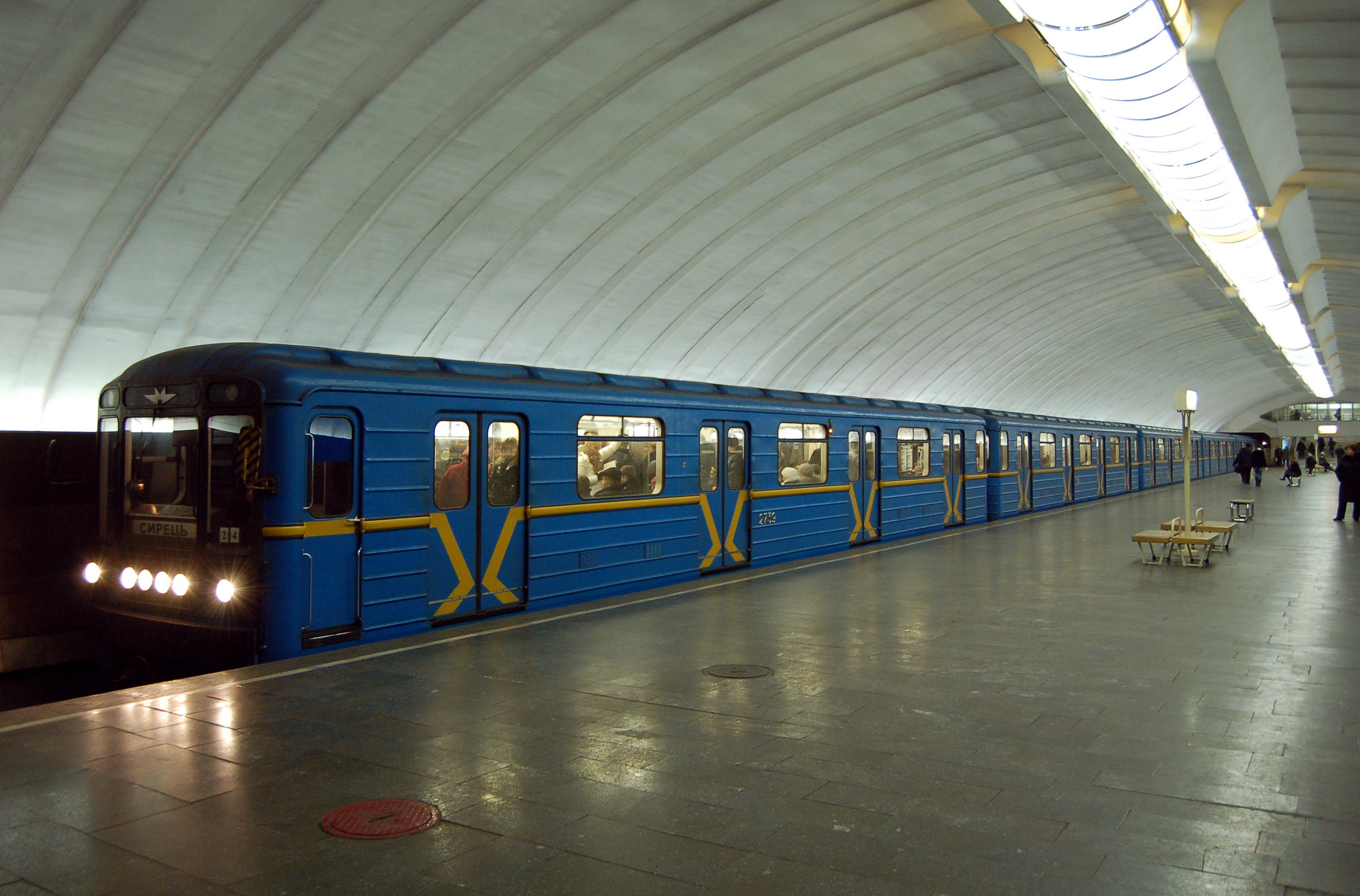 Cтанция метро «Осокорки», пассажирская платформа